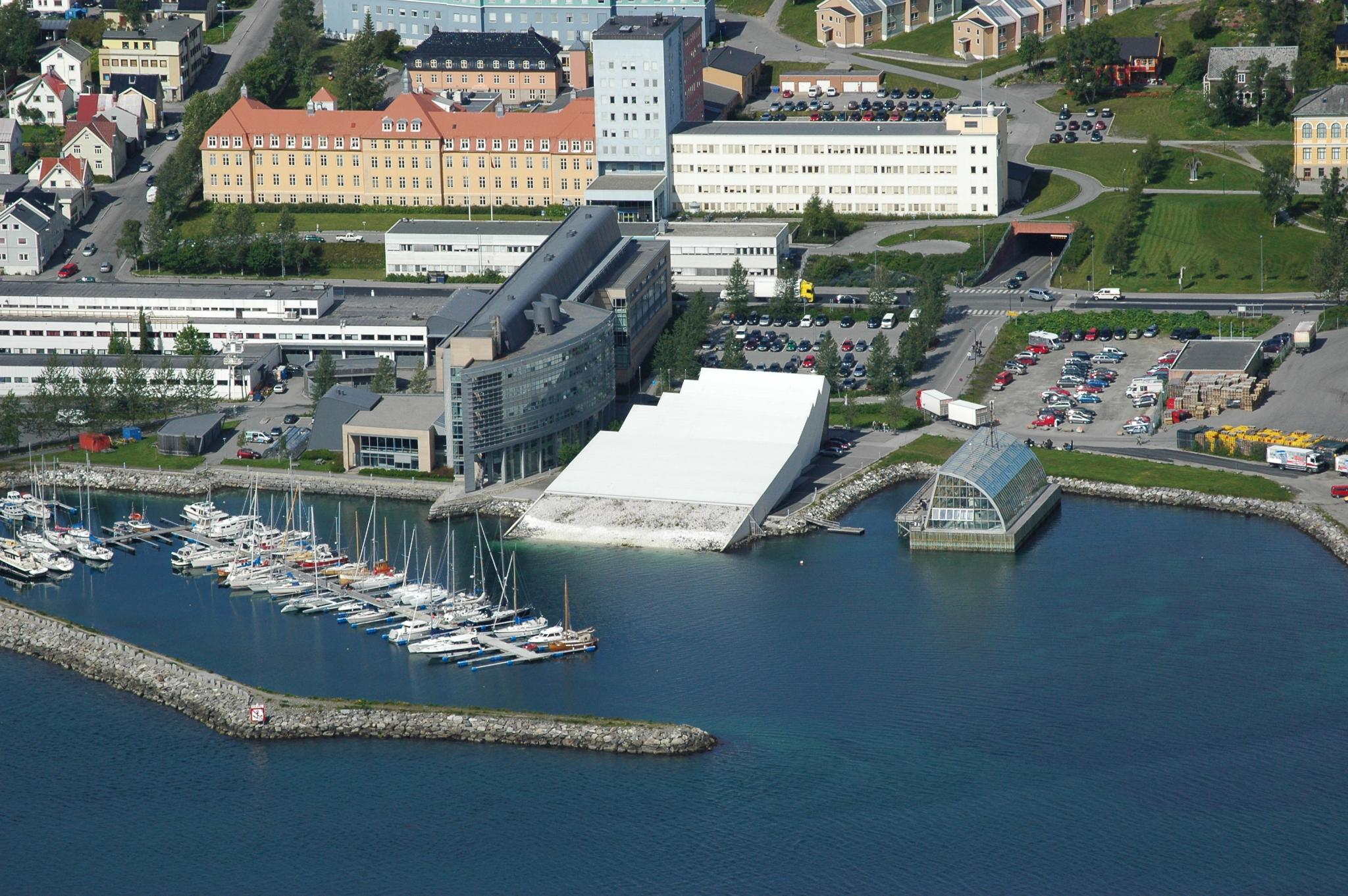 Blick über Tromsø